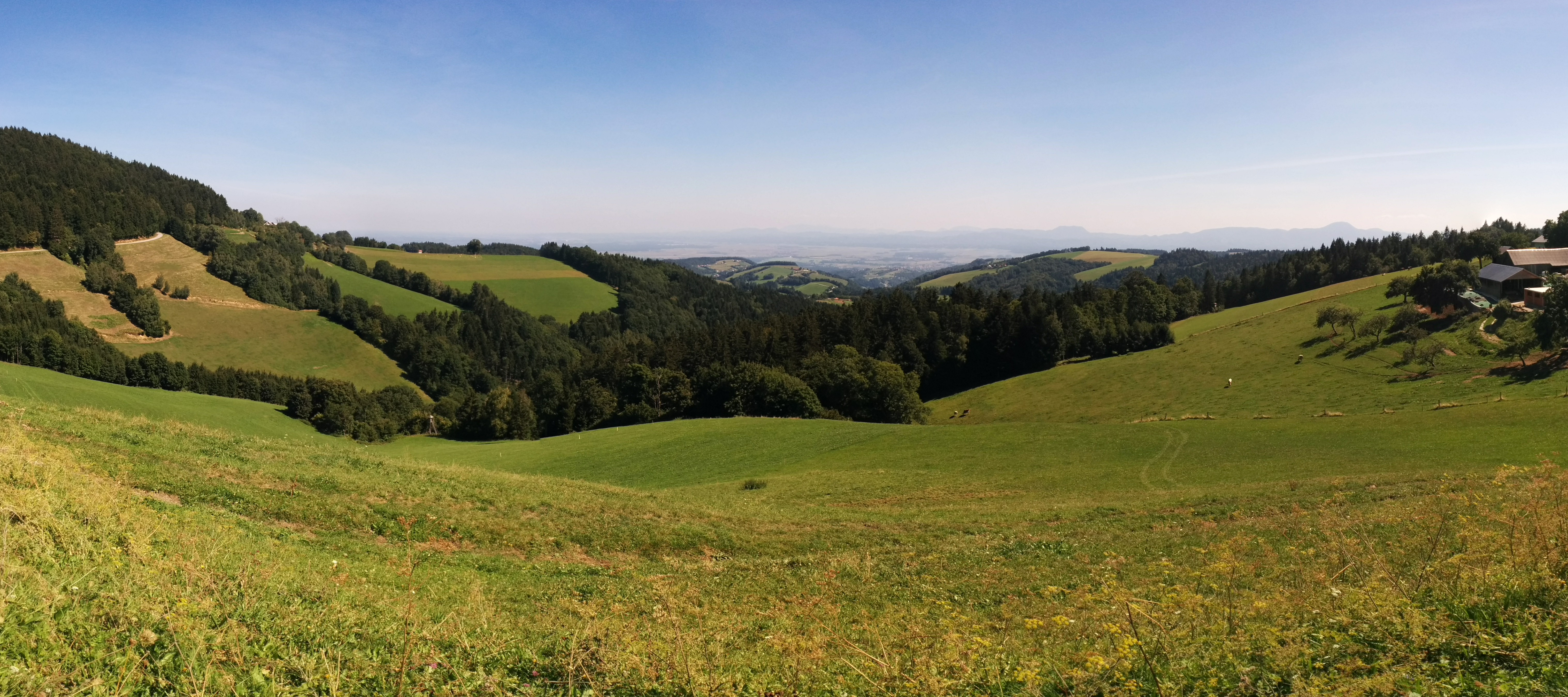 Pogled na Dravsko polje